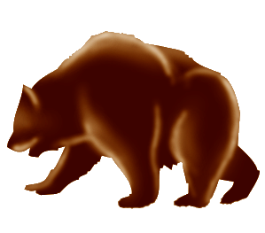 Ours des cavernes